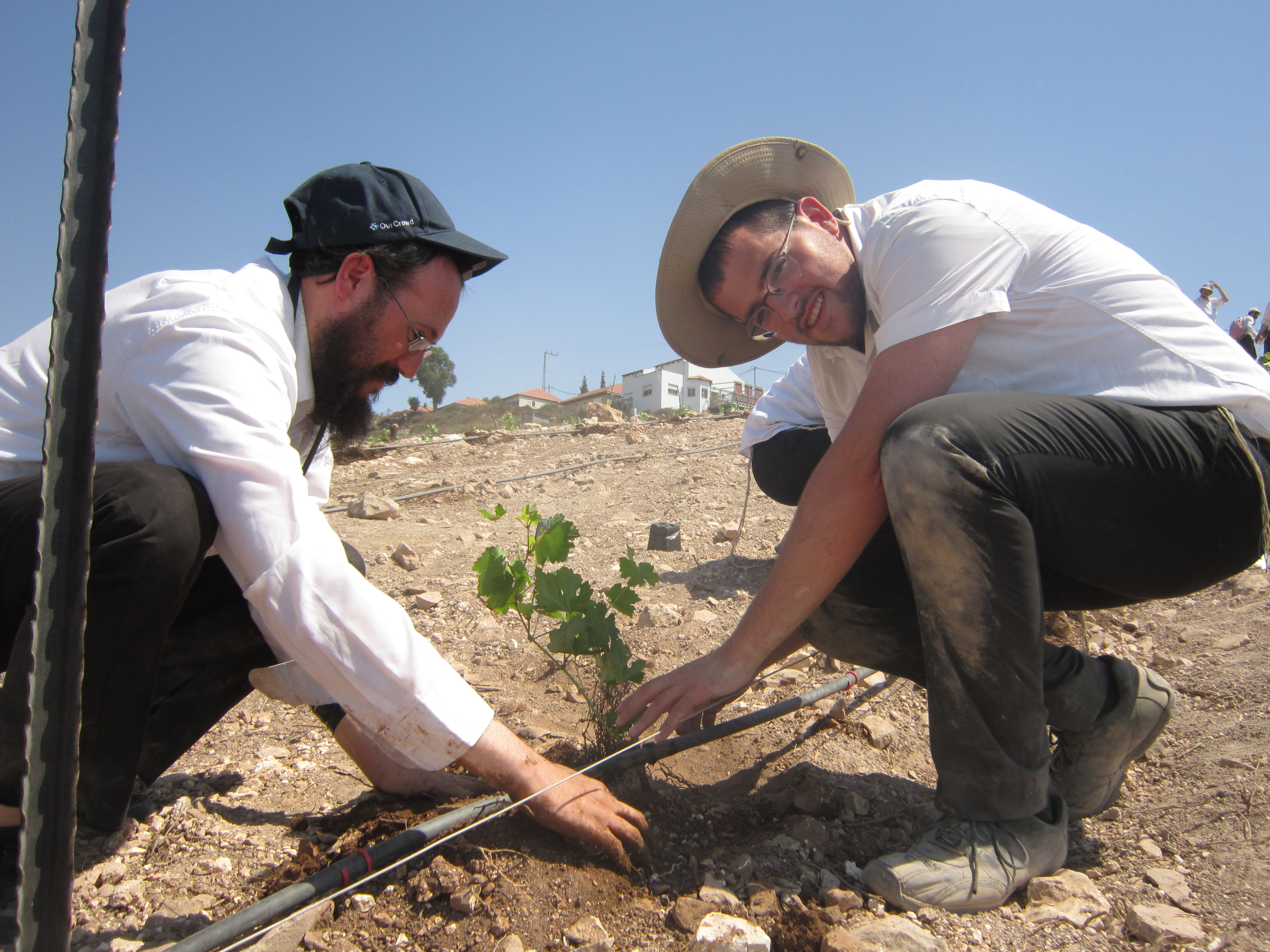 נוטעים גפנים בישוב יצהר בשומרון לפני ט"ו באב